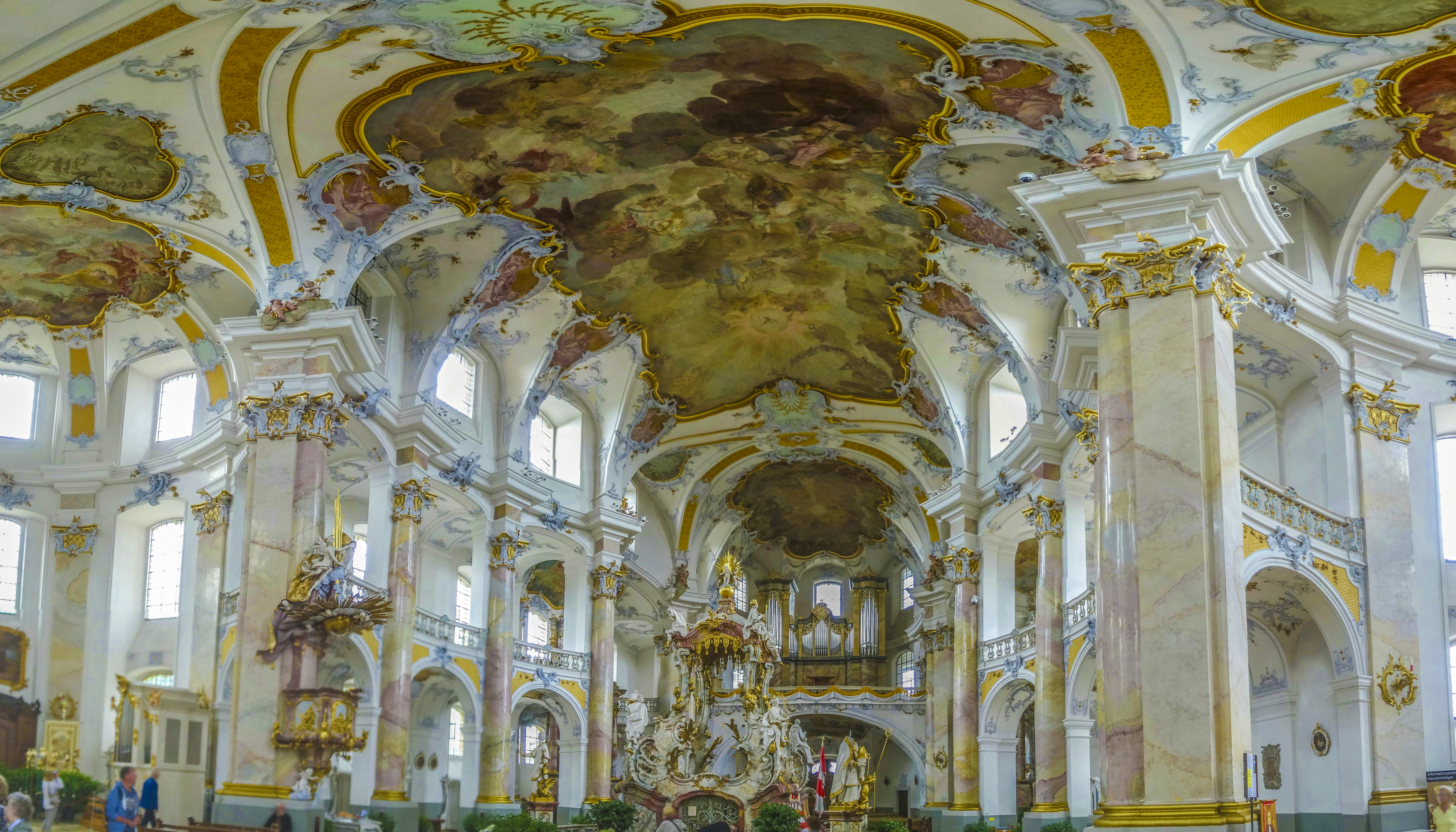 Innenraum-Panorama der Basilika Vierzehnheiligen